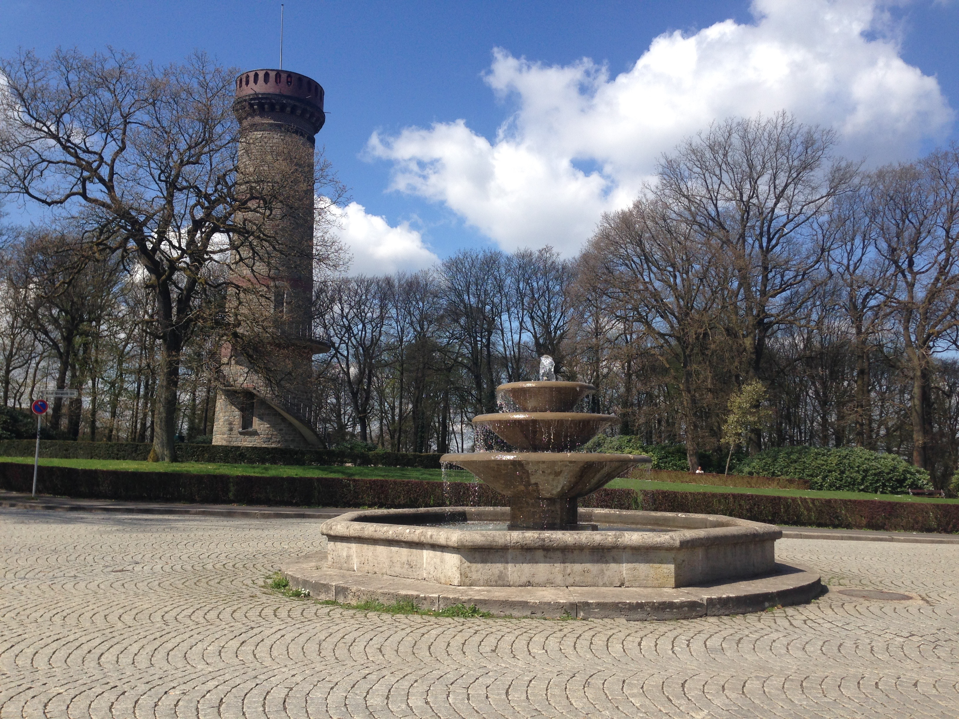 Der Brunnen am Toelleturm in den Barmer Anlagen, April 2016.